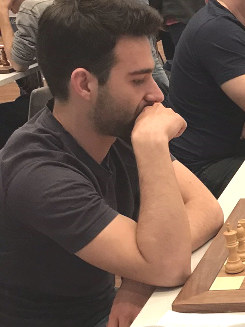 Miguoel Admiraal, Runde 8 der Grenke Chess Open 2019 in Karlsruhe.